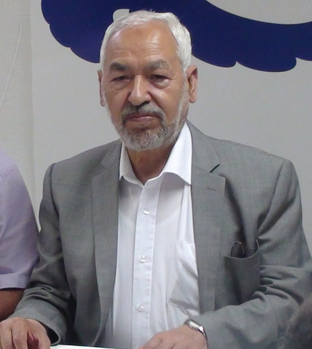 Rached Ghannouchi, président du parti Ennahdha